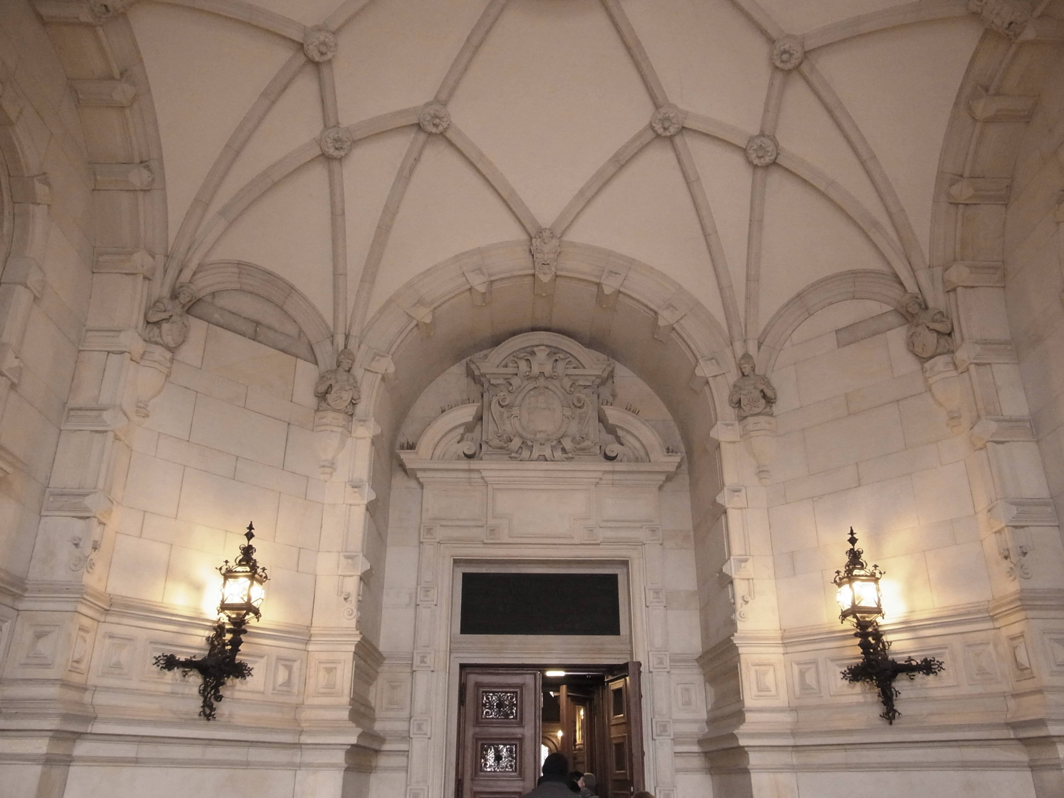 Die Turmhalle - der Eingang ins Hamburger Rathaus